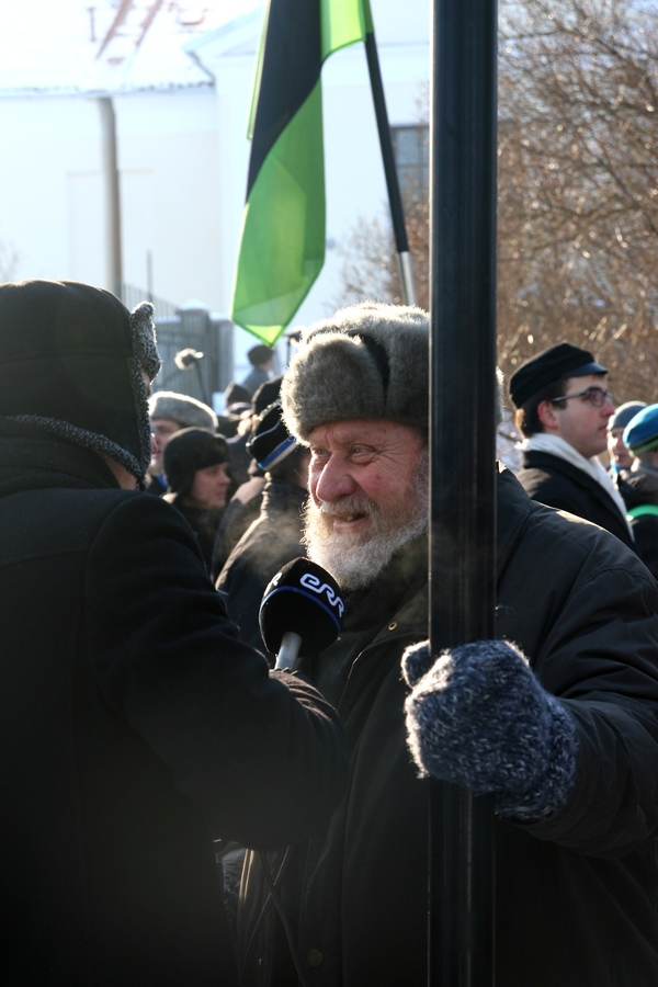 Vabariigi aastapäeva tähistamine Tartu tähetorni juures 24. veebruaril 2013